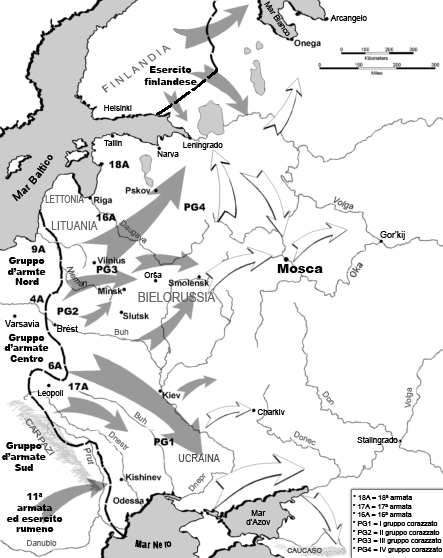 Cartina dellOperazione Barbarossa